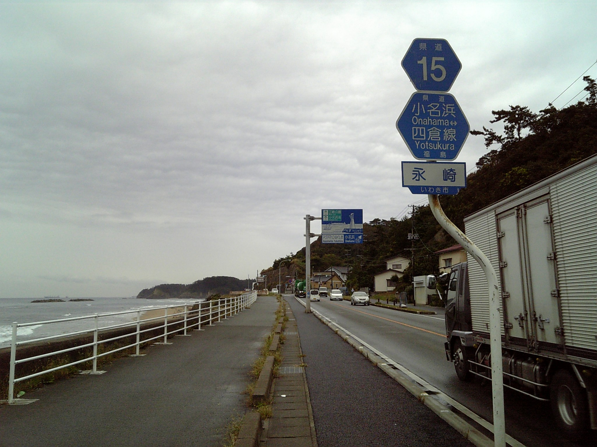 東日本大震災前の福島県道15号小名浜四倉線。いわき市永崎付近。